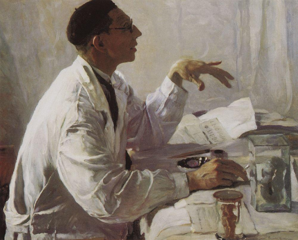 Портрет хирурга С.С. Юдина. 1935 г. Государственная Третьяковская галерея